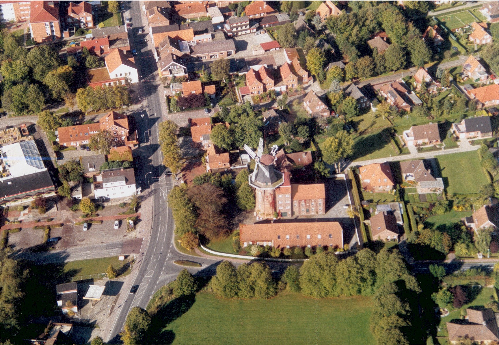 Hage Gesamtaufnahme02 Detailansicht